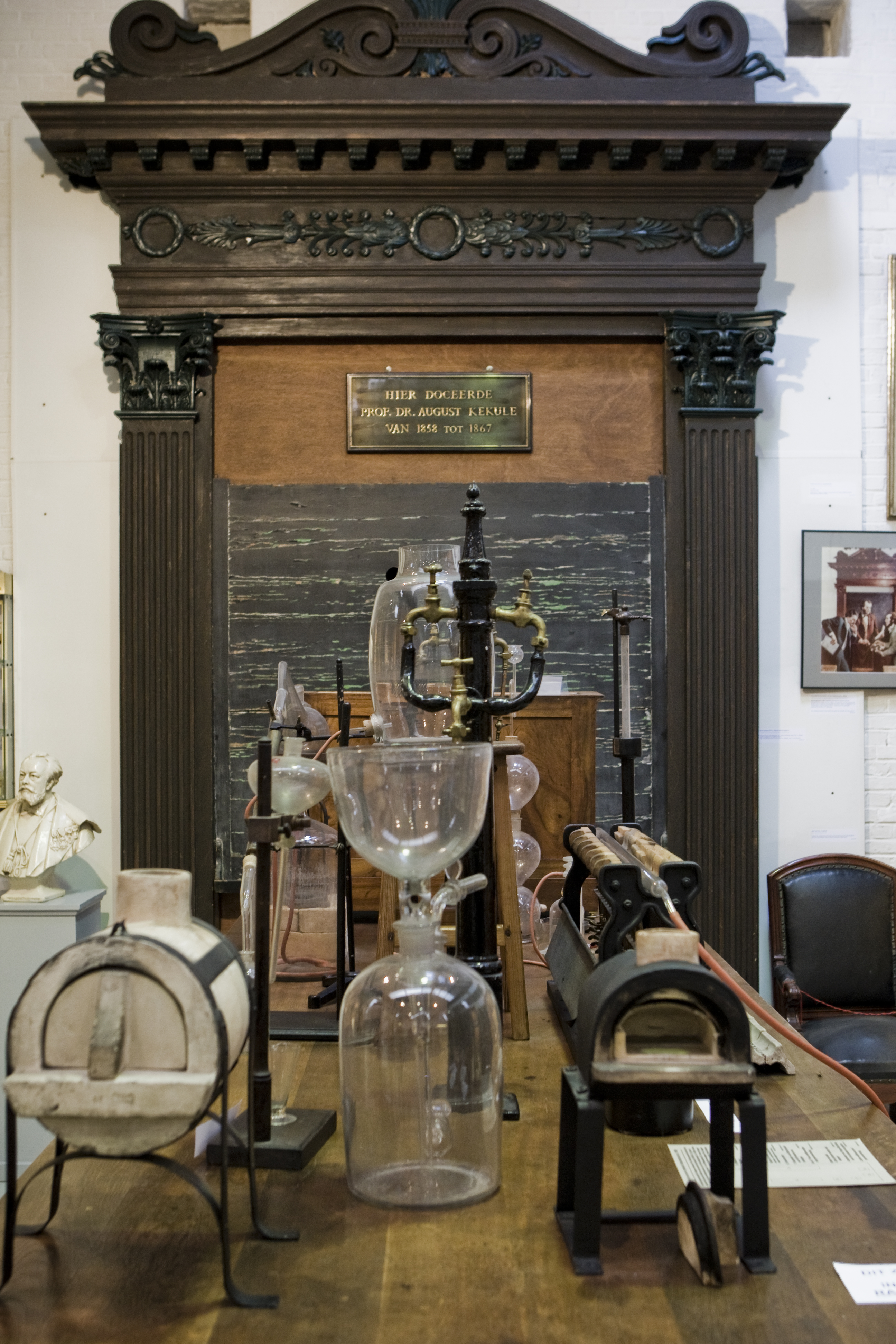 Foto van Museum voor de Geschiedenis van de Wetenschappen - Universiteit Gent. Foto gedoneerd door UGentMemorie; fotografie Pieter Morlion